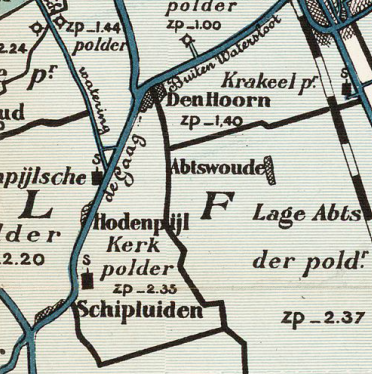 Kerkpolder